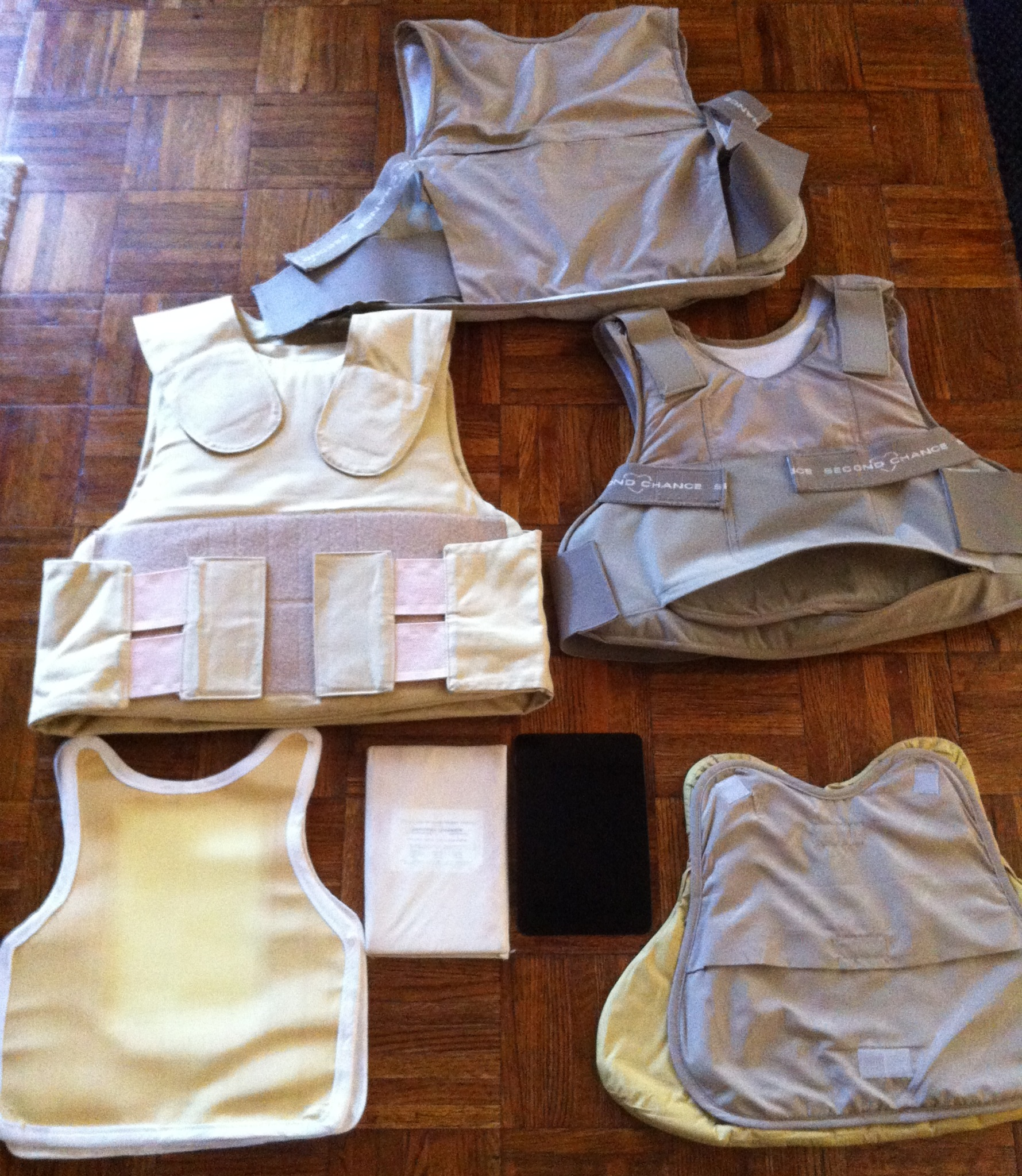 Second Chance社製2着に防弾材と防刃材を組み合わせた状態とドイツ製レベルIII+防刃+トラウマプレートの組み合わせのアウター用、中央部は胸部ポケットに差し込むソフト＆ハード2種のトラウマ・プレート、および私服インナー用軽量ベストの内部ケブラー部分のみ